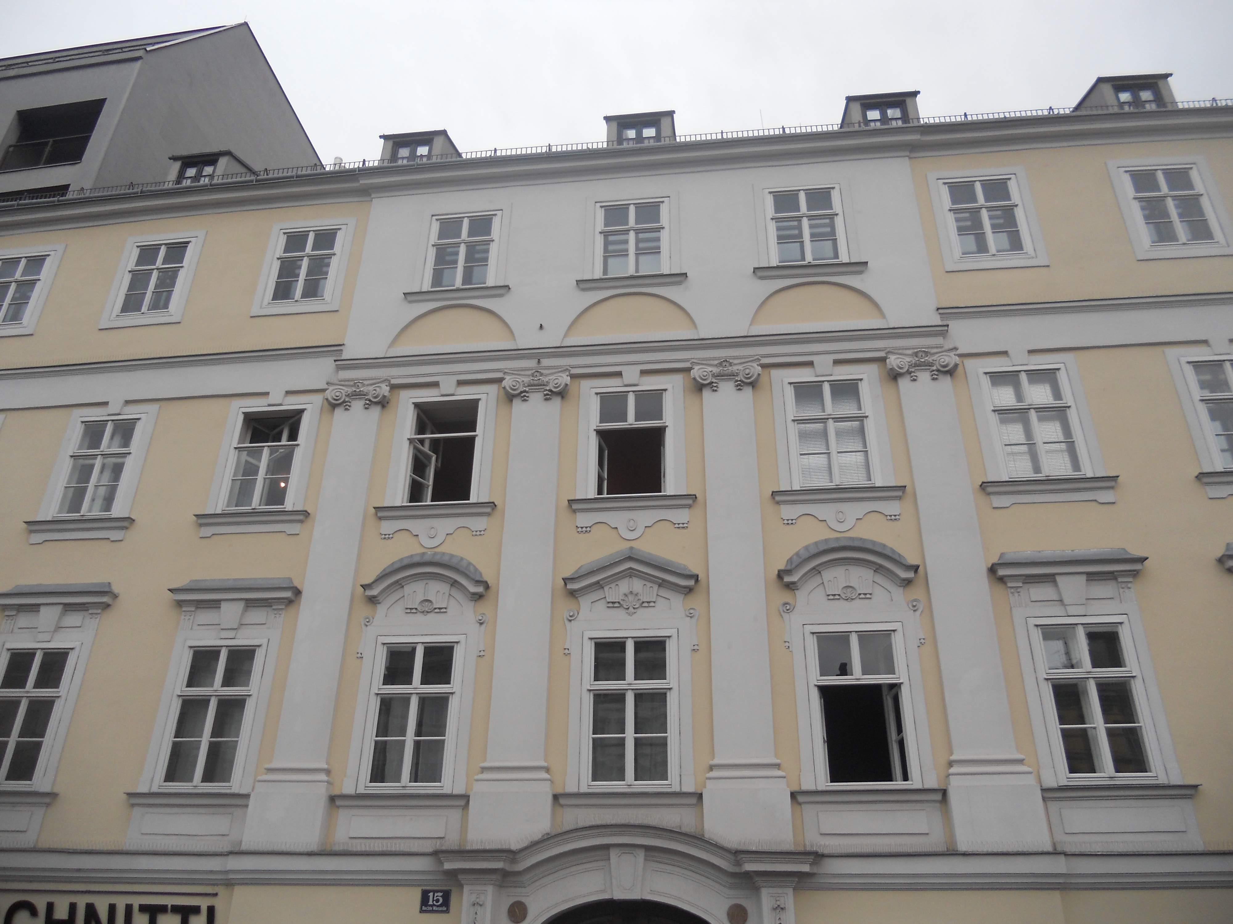 Haus Rechte Wienzeile 15 in Wien